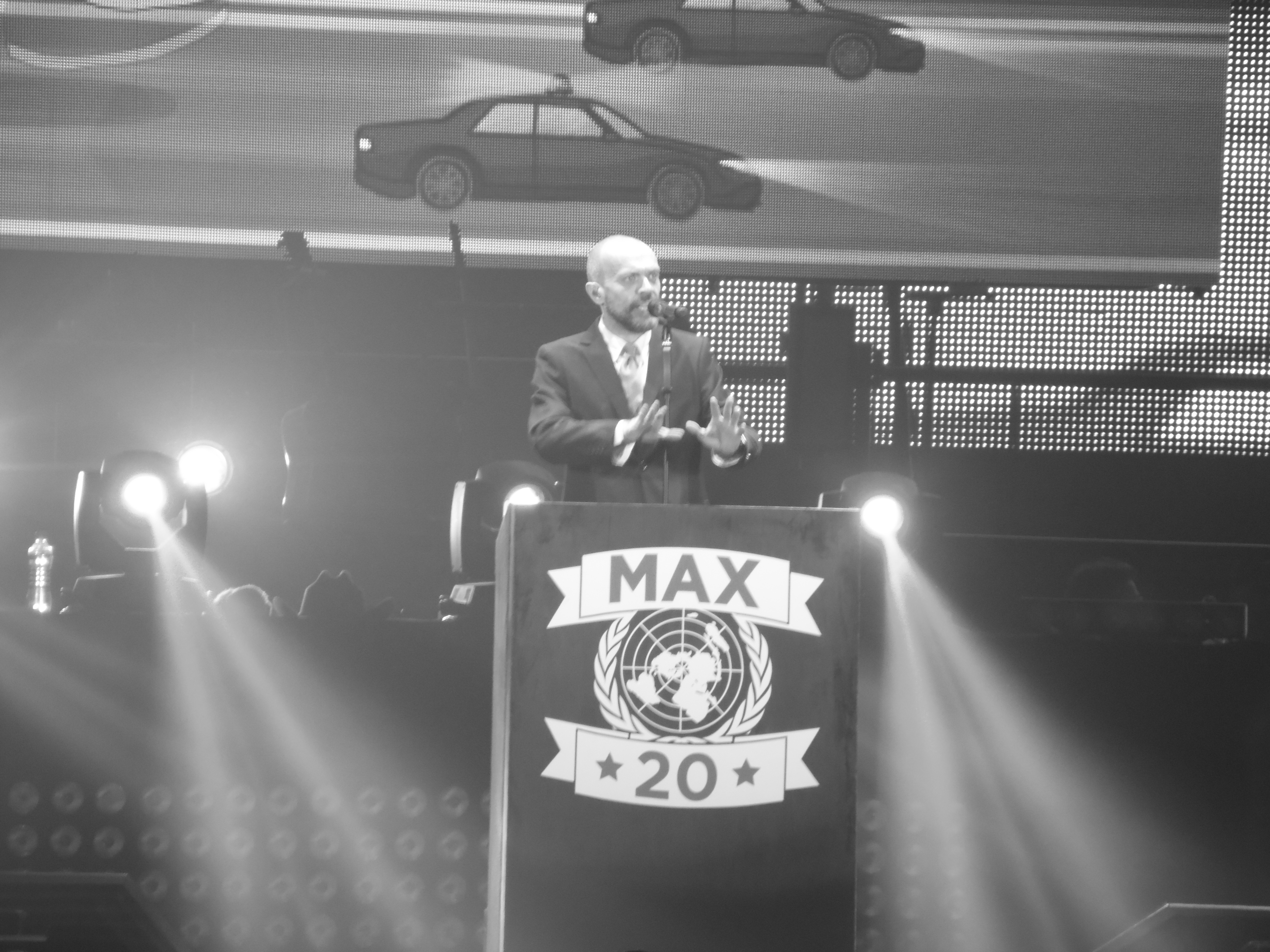 Max Pezzali in concerto durante il Max 20 Live Tour del 2013